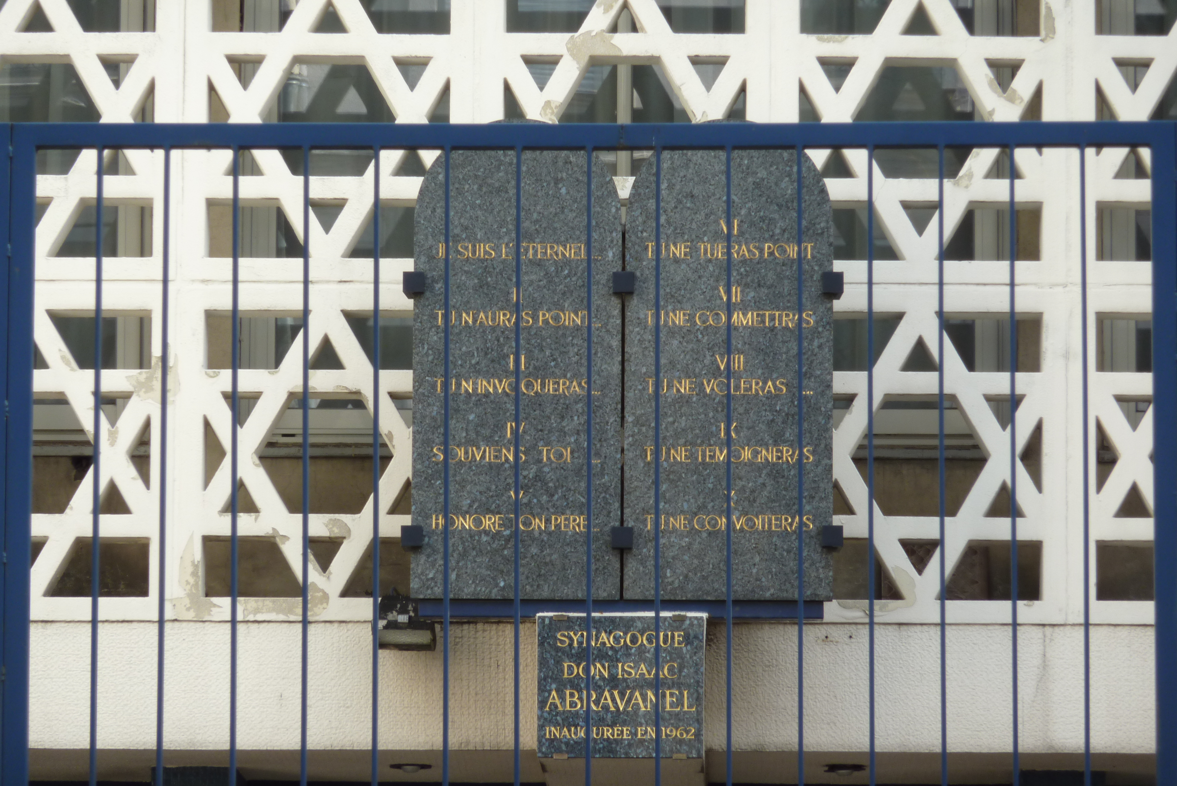 Synagoge der Rue de la Roquette, Synagogue Don Isaac Abravanel, 84/86, rue de la Roquette im 11. Arrondissement von Paris, Gesetzestafeln über dem Eingang